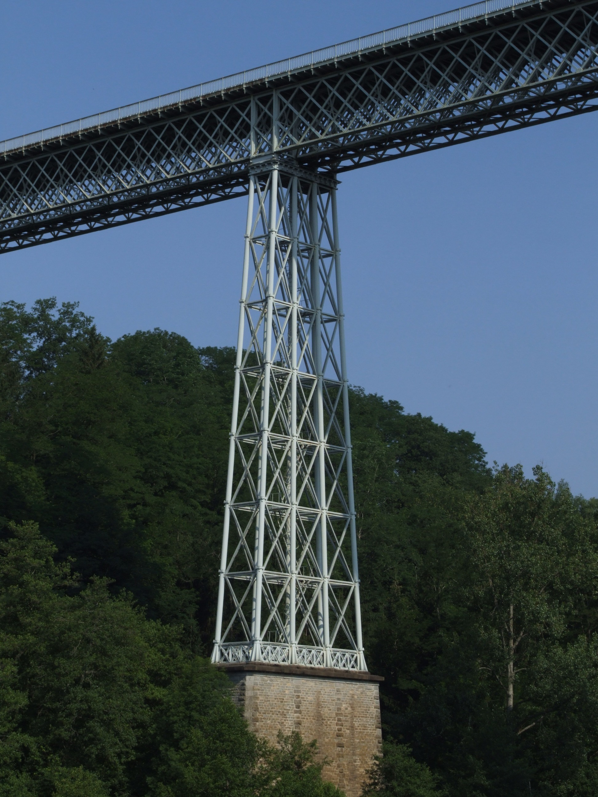 Viaduc de Busseau-sur-Creuse - Une pile : ensemble